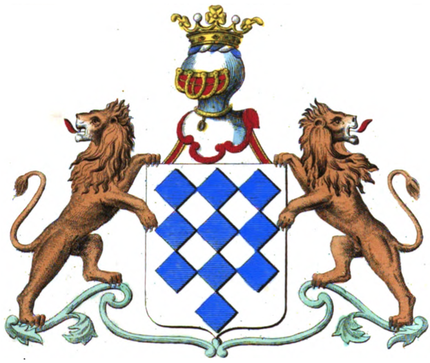 Armoiries de la famille de Cartier